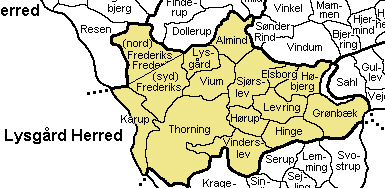 Lysgård Herred, Gl. Viborg Amt, Denmark. Map by Svend-Erik Christiansen.